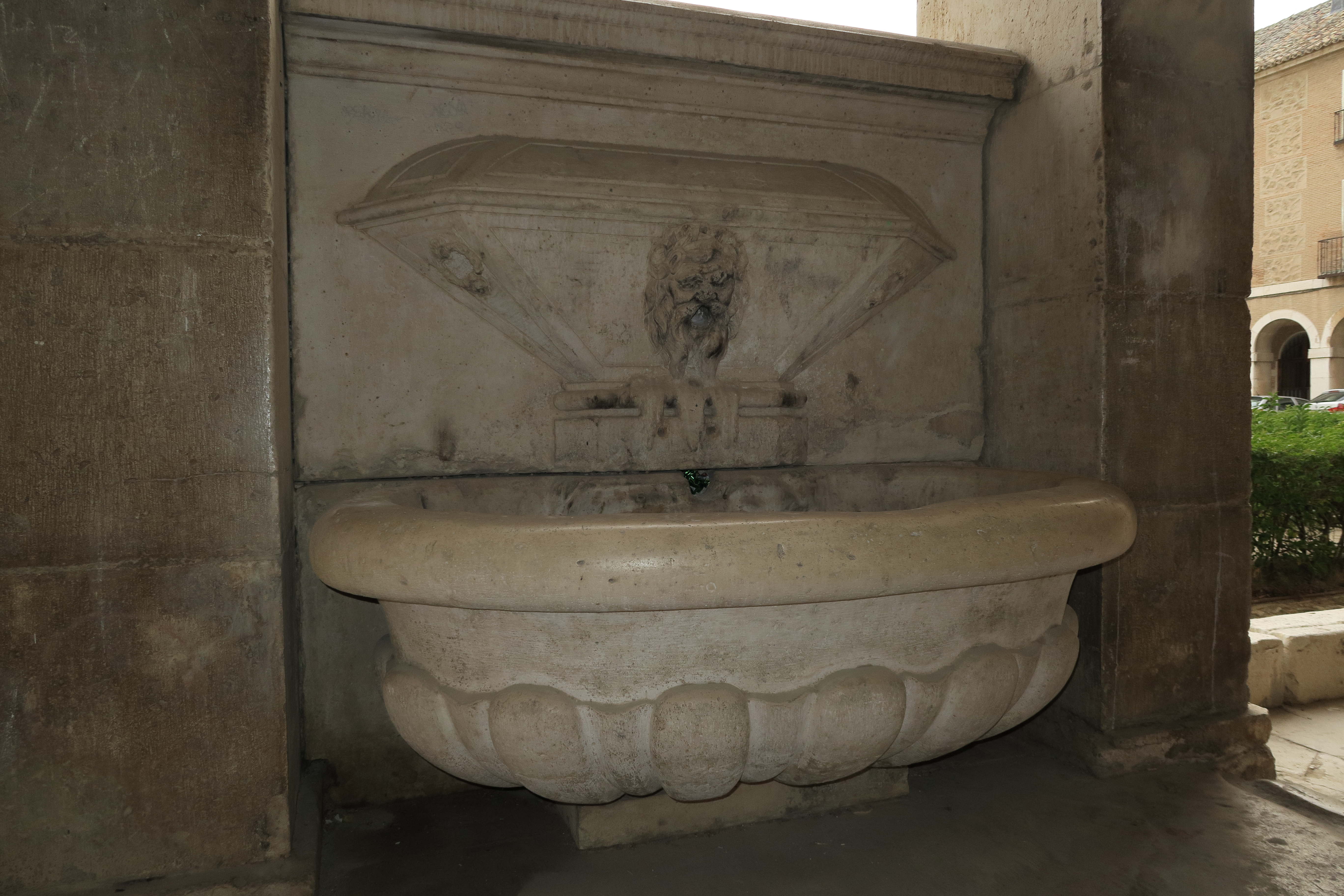 Casa de Infantes Pilón y fuente en el patio de la Casa de los Infantes